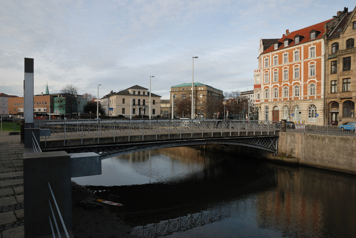 Östliche Brücke über die Okerumflut am alten Hauptbahnhof in Braunschweig